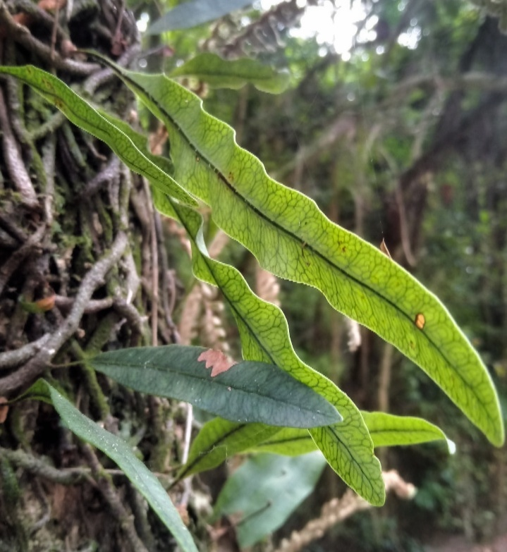 pteridófita do gênero Microgramma muito encontrada no campus da USP São Paulo. Possivelmente Microgramma squamulosa